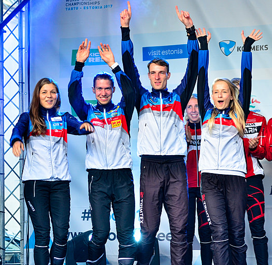 WOC2017 Tartu (EST) - Sprintové štafety - 4. místo - Jana Knapová, Miloš Nykodým, Vojtěch Král, Denisa Kosová